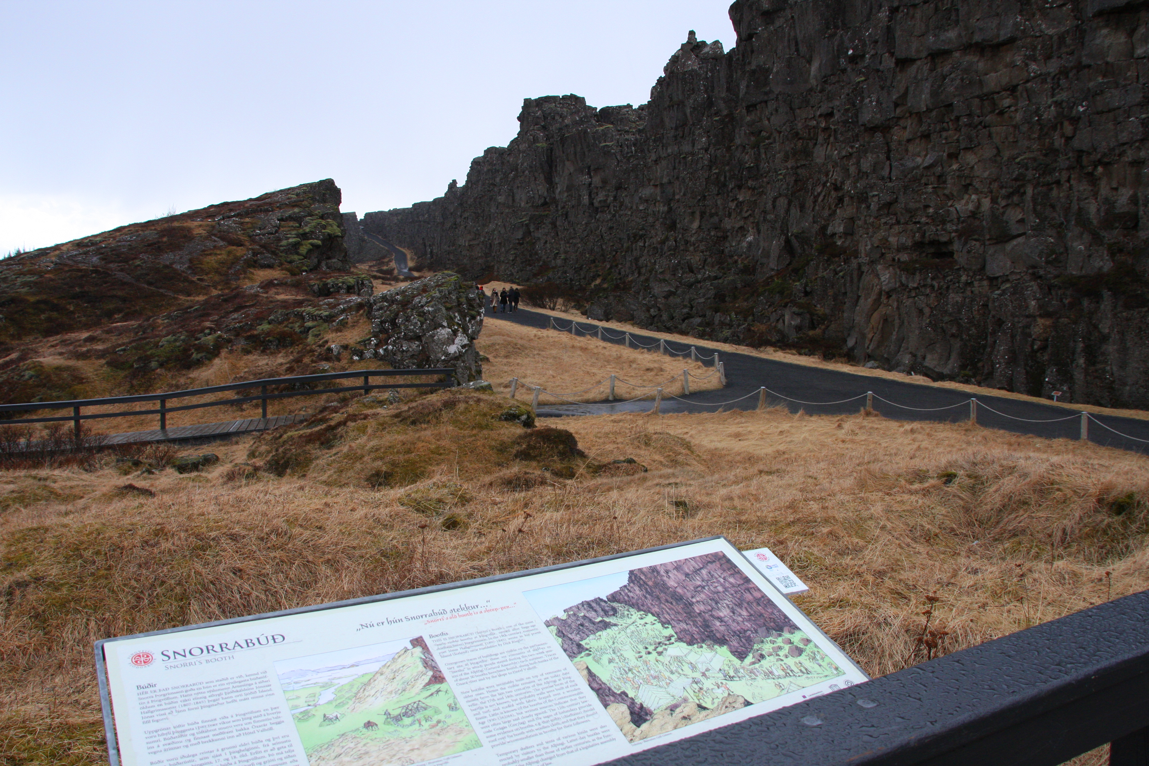 El Parque Nacional de Thingvellir Islandia. Fotografías tomadas en mi viaje con Tierras Polares del 27 de marzo al 2 de abril de 2013. Þingvellir ( pronunciación islandesa: [ˌ θiŋk vɛtlɪr̥] , cosa campos ) es un lugar en Bláskógabyggð en el suroeste de Islandia , cerca de la península de Reykjanes y la Hengill volcánica de la zona. Þingvellir es un lugar de importancia histórica, cultural y geológica y es uno de los destinos turísticos más populares en Islandia . Es el sitio de una fosa tectónica que marca la cresta de la Cordillera del Atlántico Medio . También es el hogar de Þingvallavatn , el lago natural más grande de Islandia. Parlamento o Alþingi se estableció en Þingvellir en 930 y permaneció allí hasta 1789. ElParque Nacional Þingvellir fue fundada en 1930 para proteger los restos del sitio parlamento y posteriormente se amplió para proteger a los fenómenos naturales en los alrededores. Parque Nacional de Þingvellir fue el primer parque nacional de Islandia y se decretó un "santuario nacional protegido para todos los islandeses, la propiedad perpetua de la nación islandesa bajo la preservación del Parlamento, para no ser vendidos o hipotecados". Fuente y más información : Web : Fotografías : Mi Blog de Islandia : .es/ Ver el video